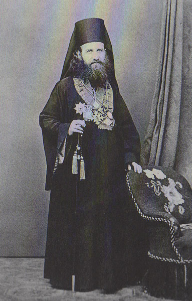 фотографија око 1865.